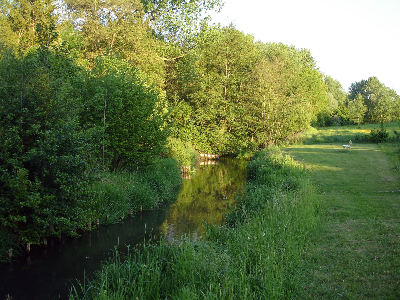 La Viosne à Santeuil, Val-d'Oise, France.